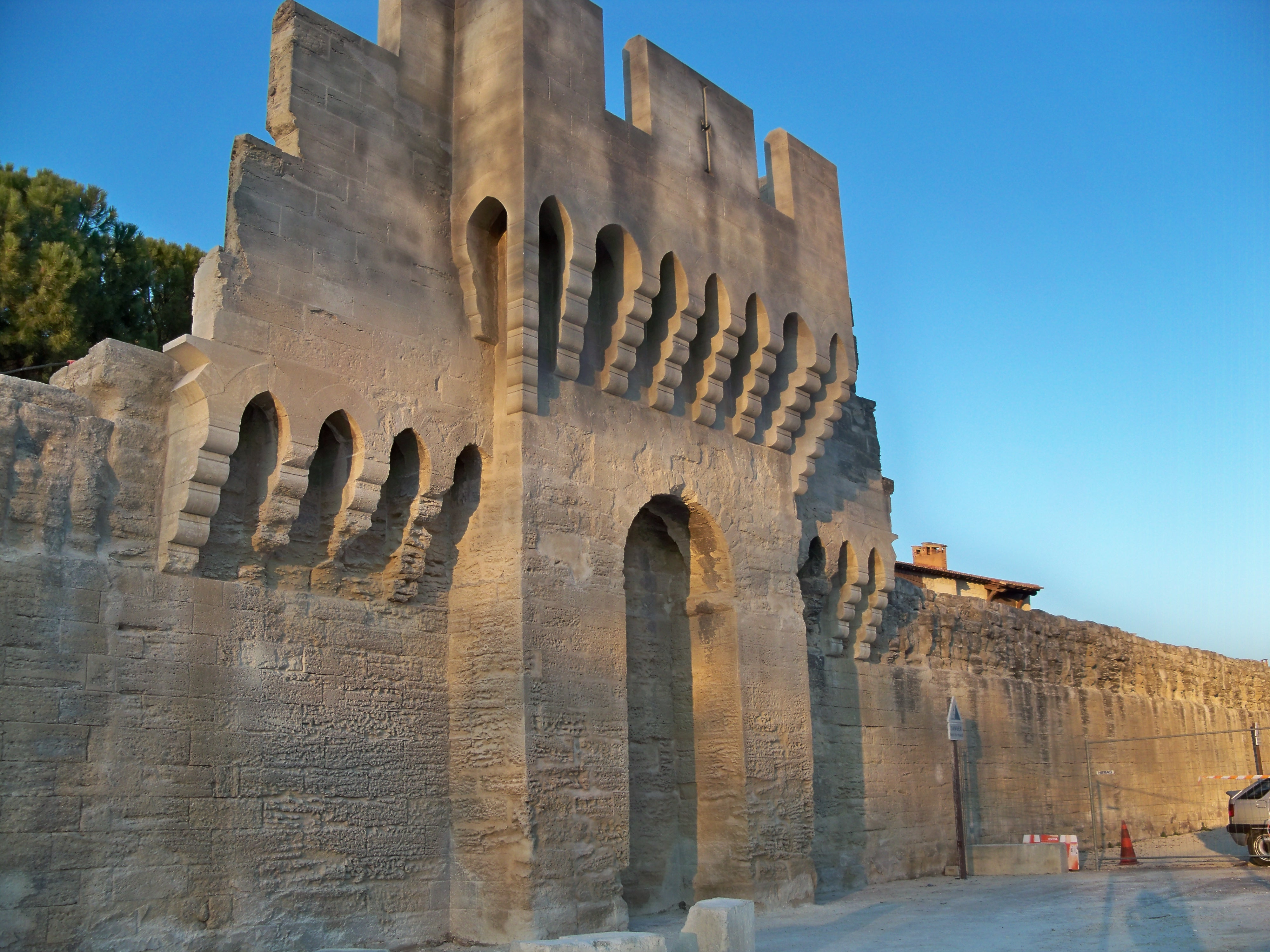 partie des remparts d'Avignon (Vaucluse, France)